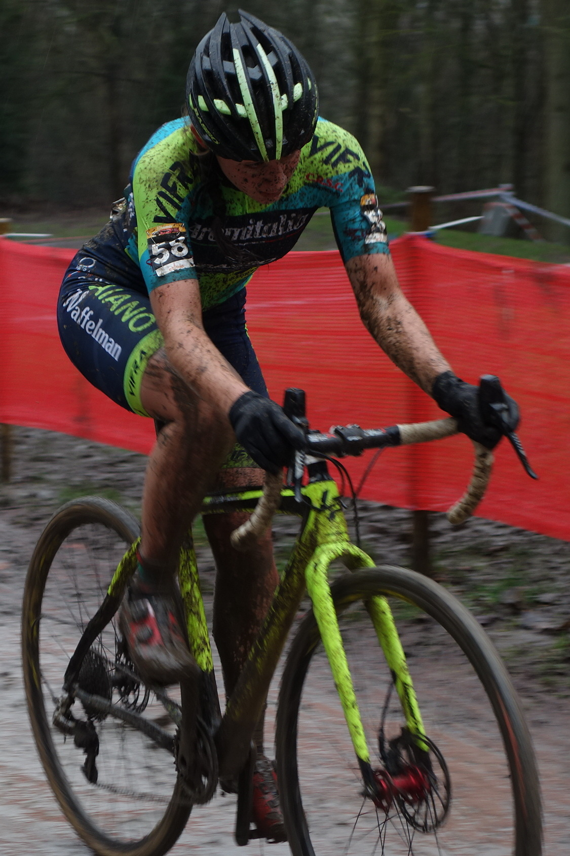 Wereldbeker veldrijden op de Citadel van Namen op zondag 22 december 2019